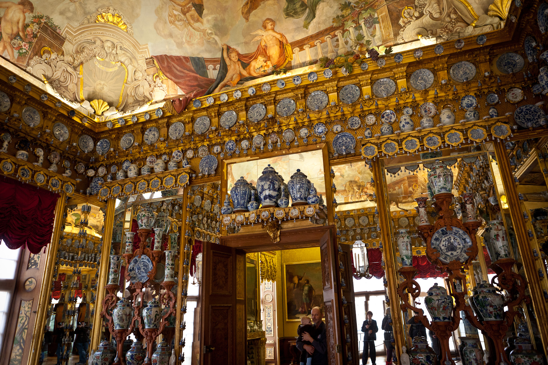 Berlin